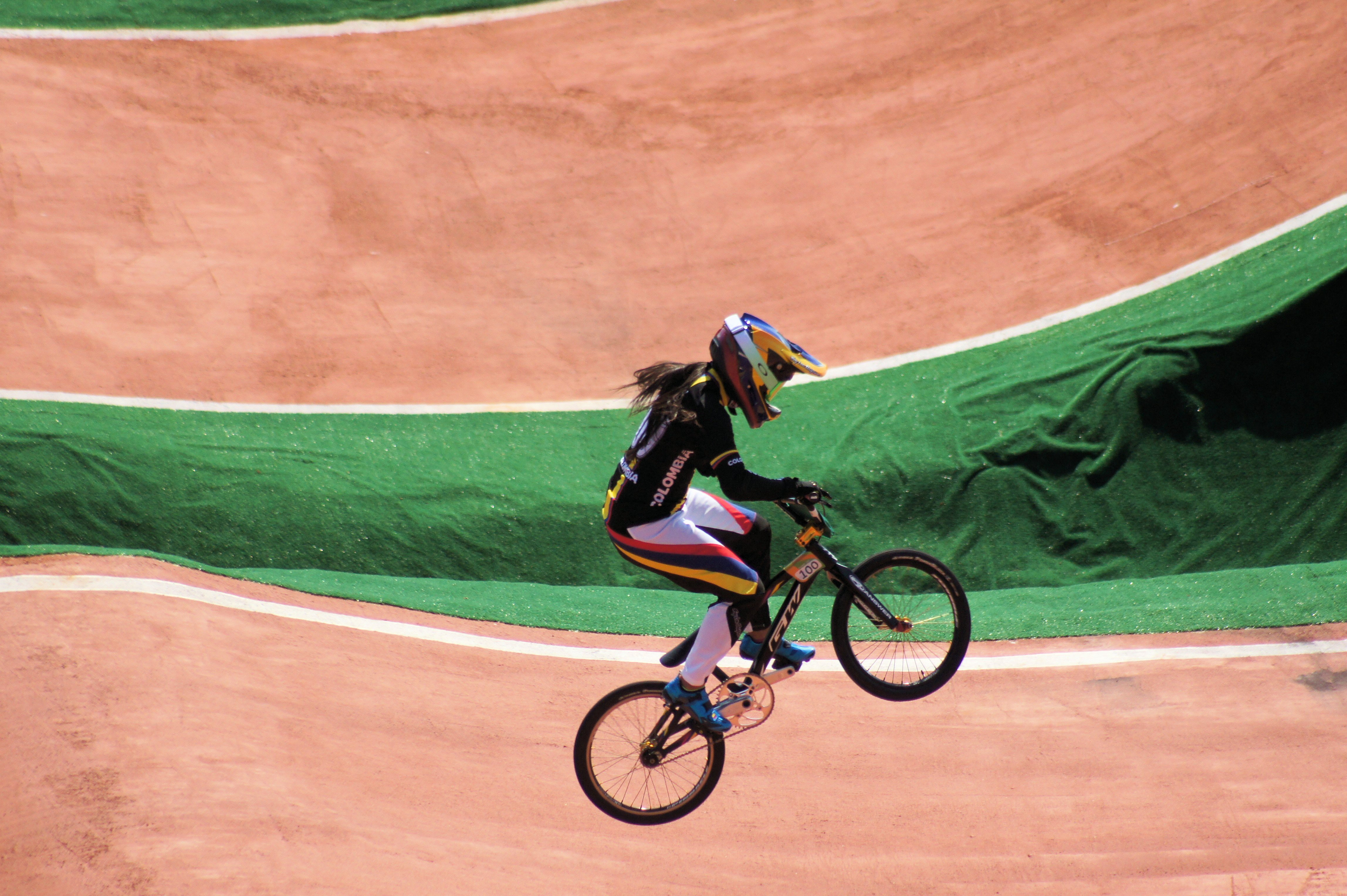 slt.a33